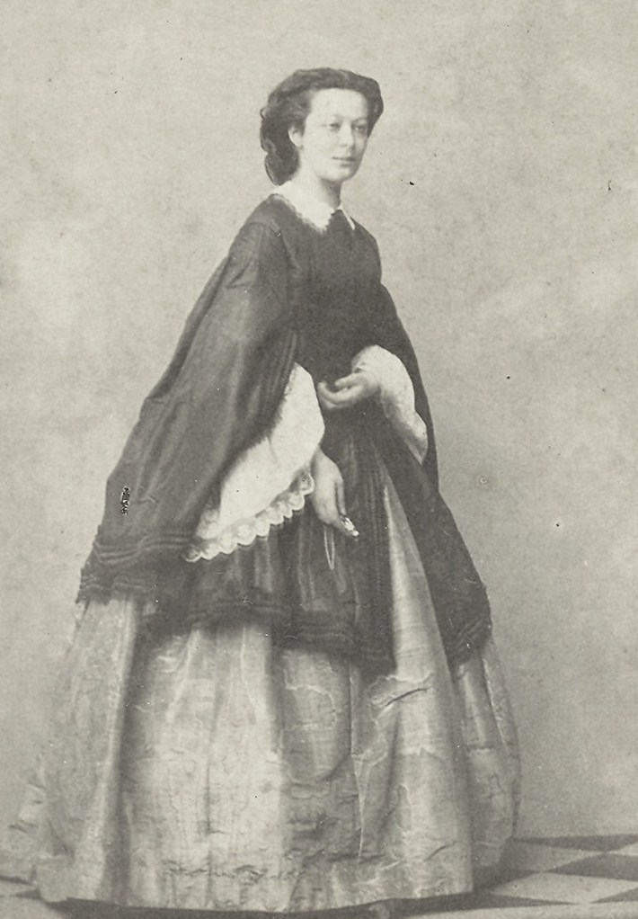 Алекса́ндра Серге́евна Альбединская, урождённая княжна Долгорукова (18 (30) ноября 1834 — 12 сентября 1913) — фрейлина императрицы Марии Александровны. Фаворитка императора Александра II (с начала 1850-х до 1862 года)[1]. Статс-дама (1896). Кавалерственная дама ордена Святой Екатерины.